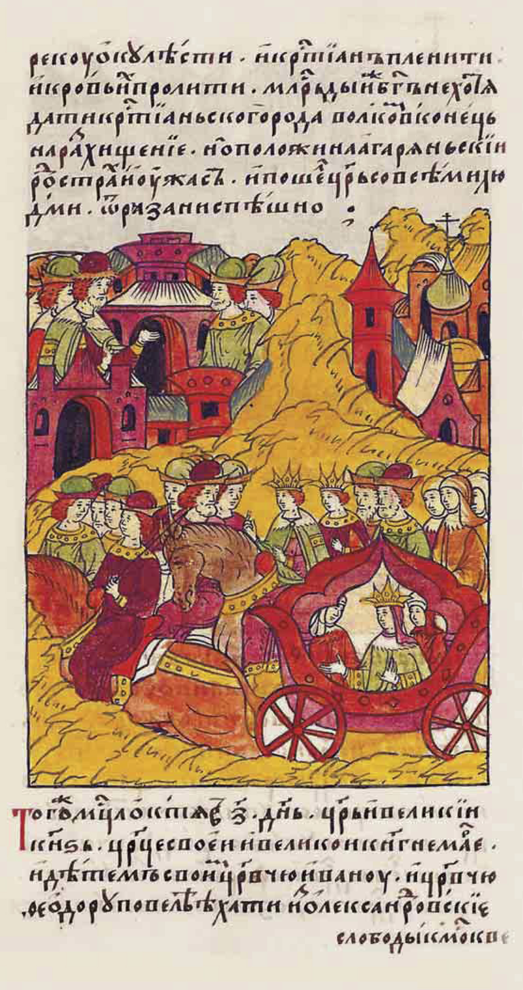 Лицевой летописный свод "В том же месяце октябре в 7 день царь и великий князь царице своей и великой княгине Марье и детям сво- им царевичу Ивану и царевичу Федору повелел ехать из Алек- сандровской слободы к Москве...." Page de la Chronique illustrée d'Ivan le Terrible (ru): « Ce même mois d'octobre, le 7, le tsar et grand-prince ordonna à sa tsarine et grande princesse Maria, et à ses enfants le tsarévitch Ivan et le tsarévitch Fédor d'aller de la Sloboda d'Alexandrov à Moscou ... ».